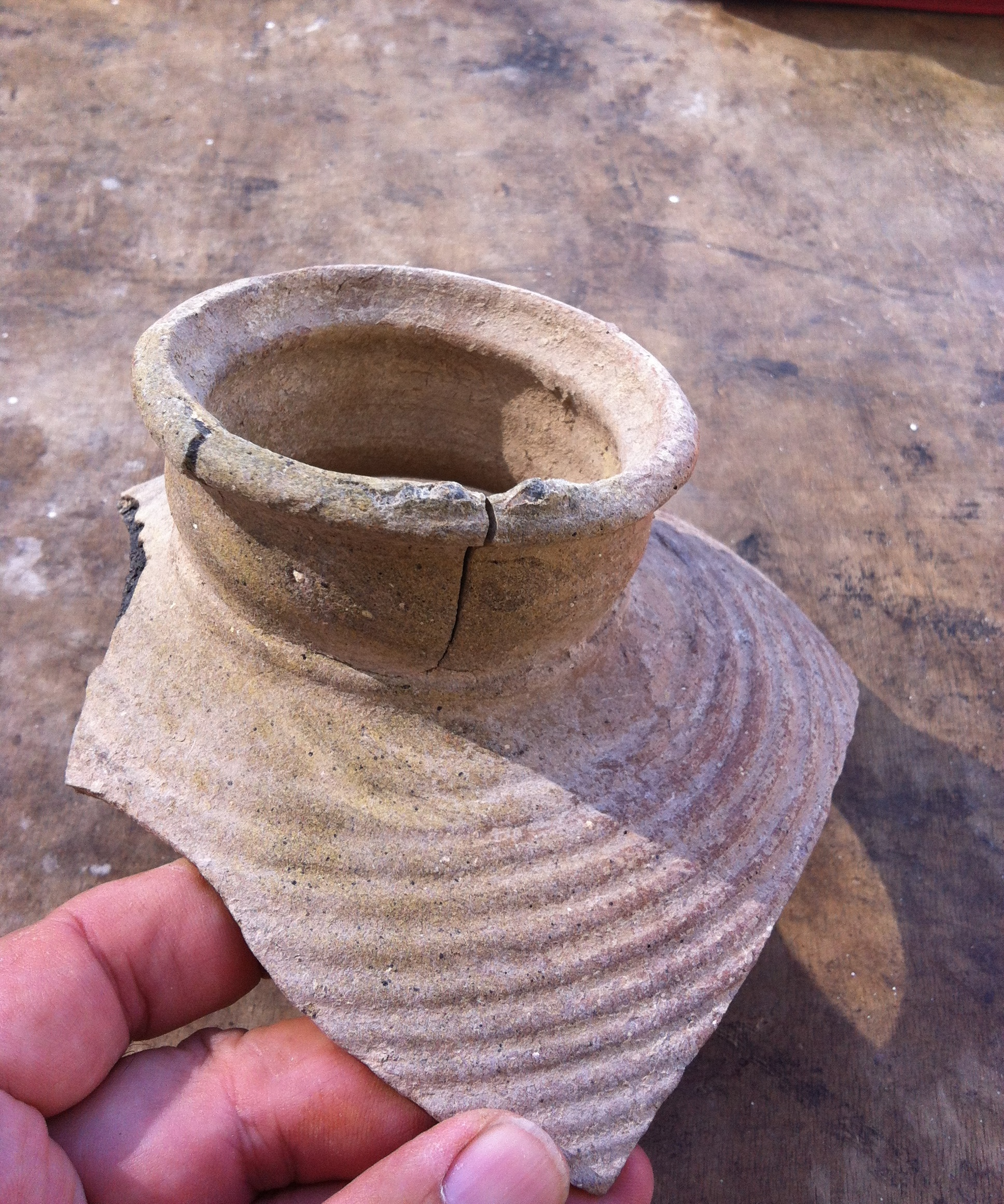 שיחין היה יישוב עתיק מתקופת בית שני והתלמוד ששכן ליד ציפורי. בשנת 2012 החלו באתר חפירות ארכולוגיות קנקן שיחין שנפגם בכבשן